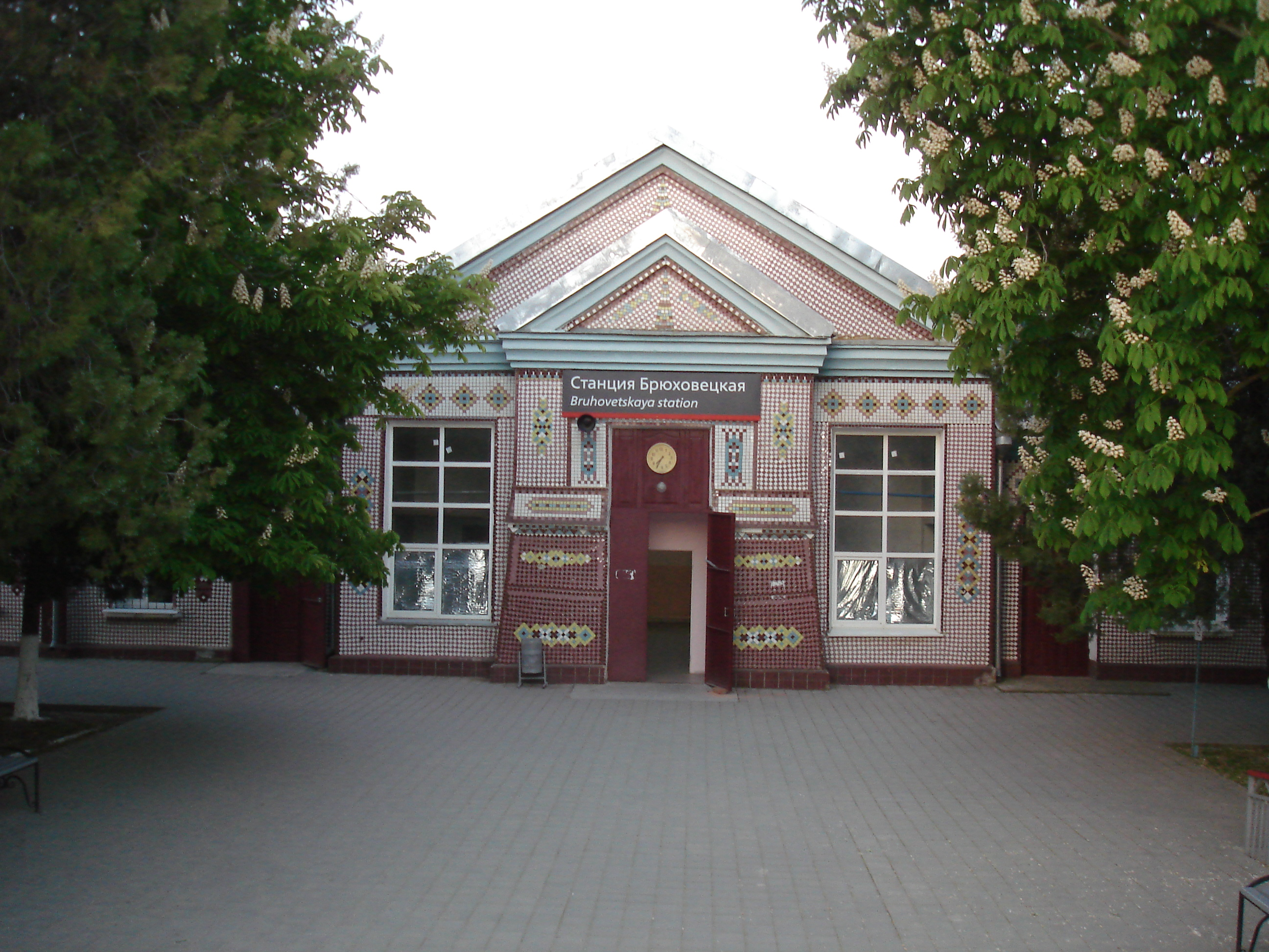 ЖД-станция Брюховецкая